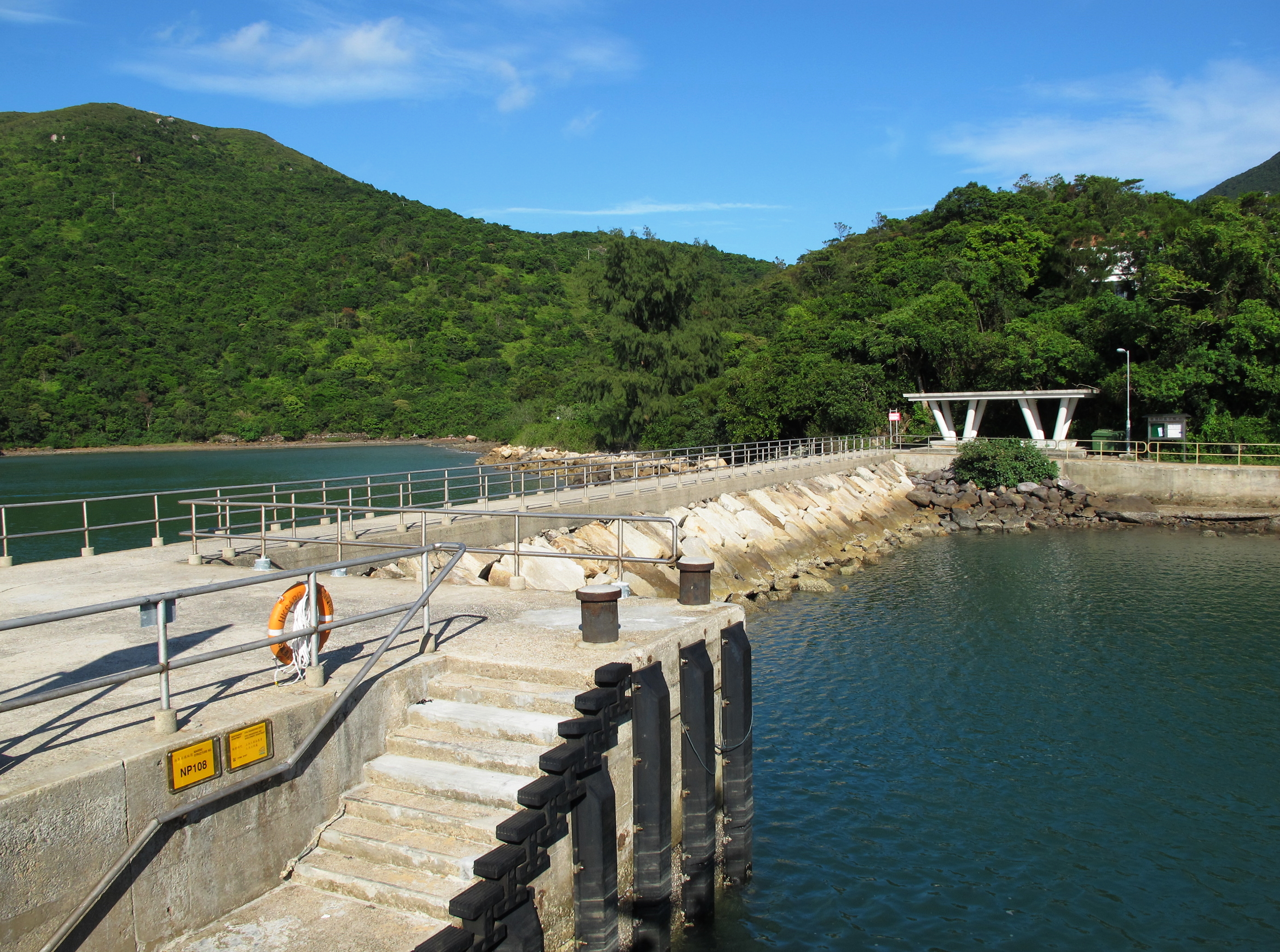 Chek Keng Pier